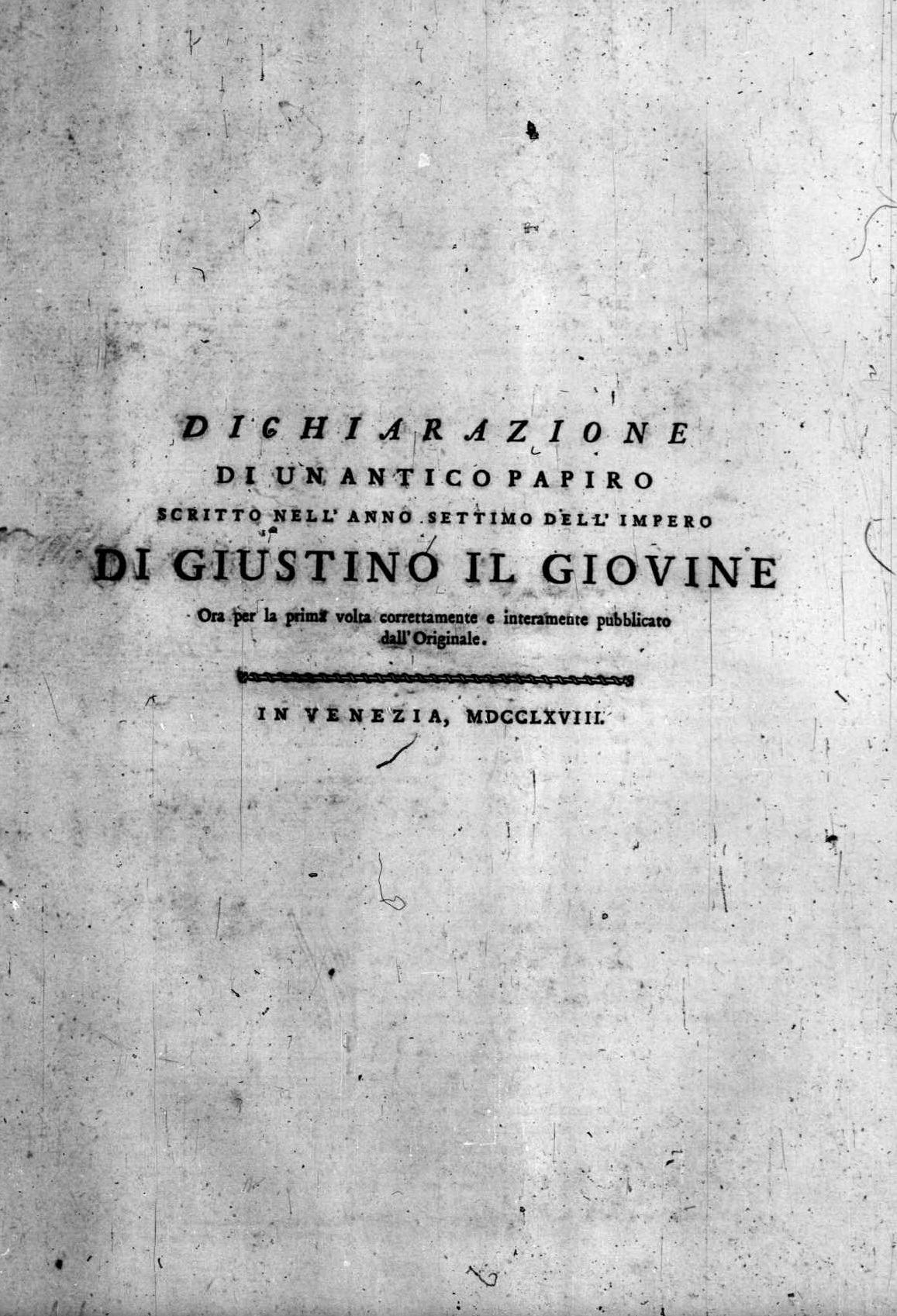 Frontespizio